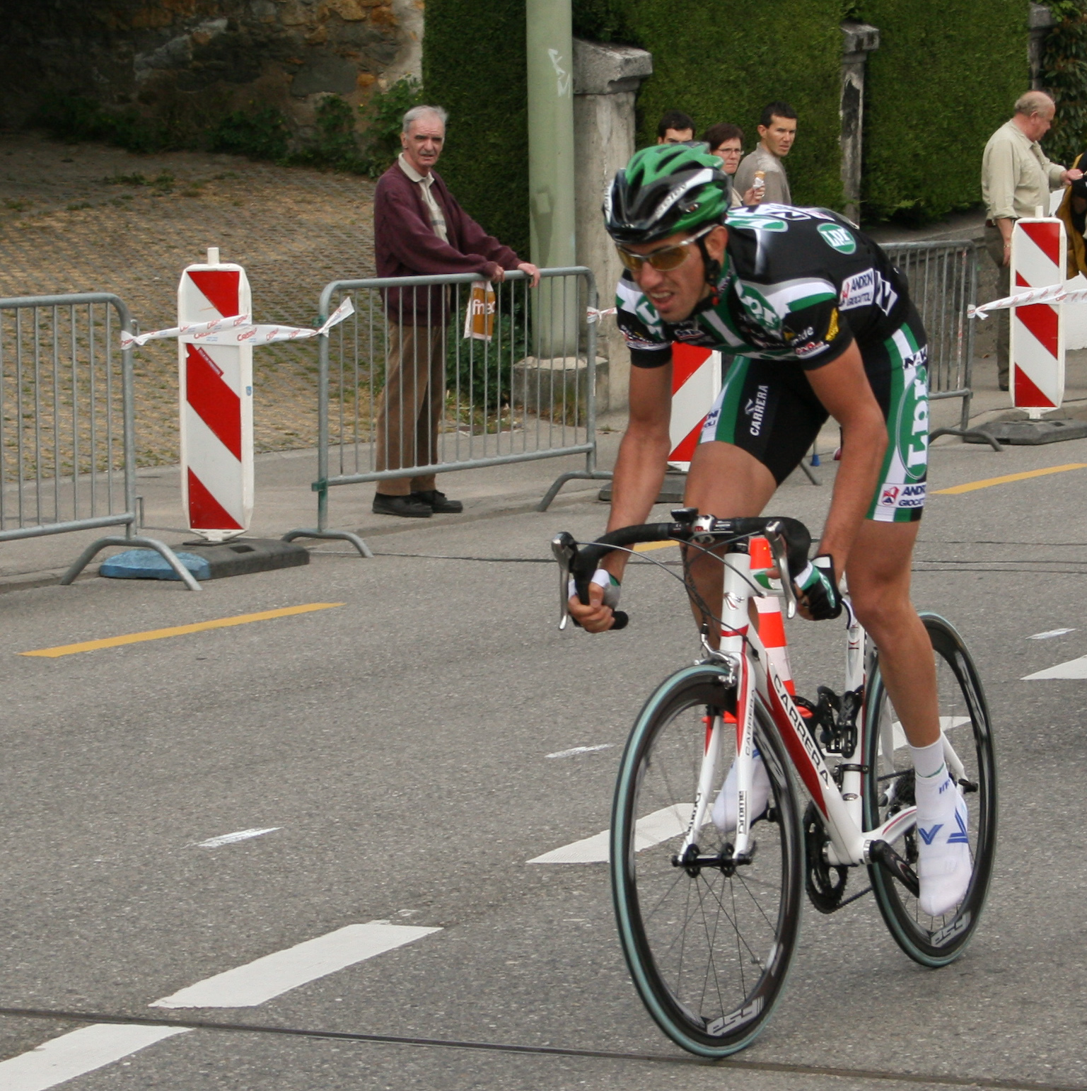 Paolo Bailetti prologue du Tour de Romandie 2007